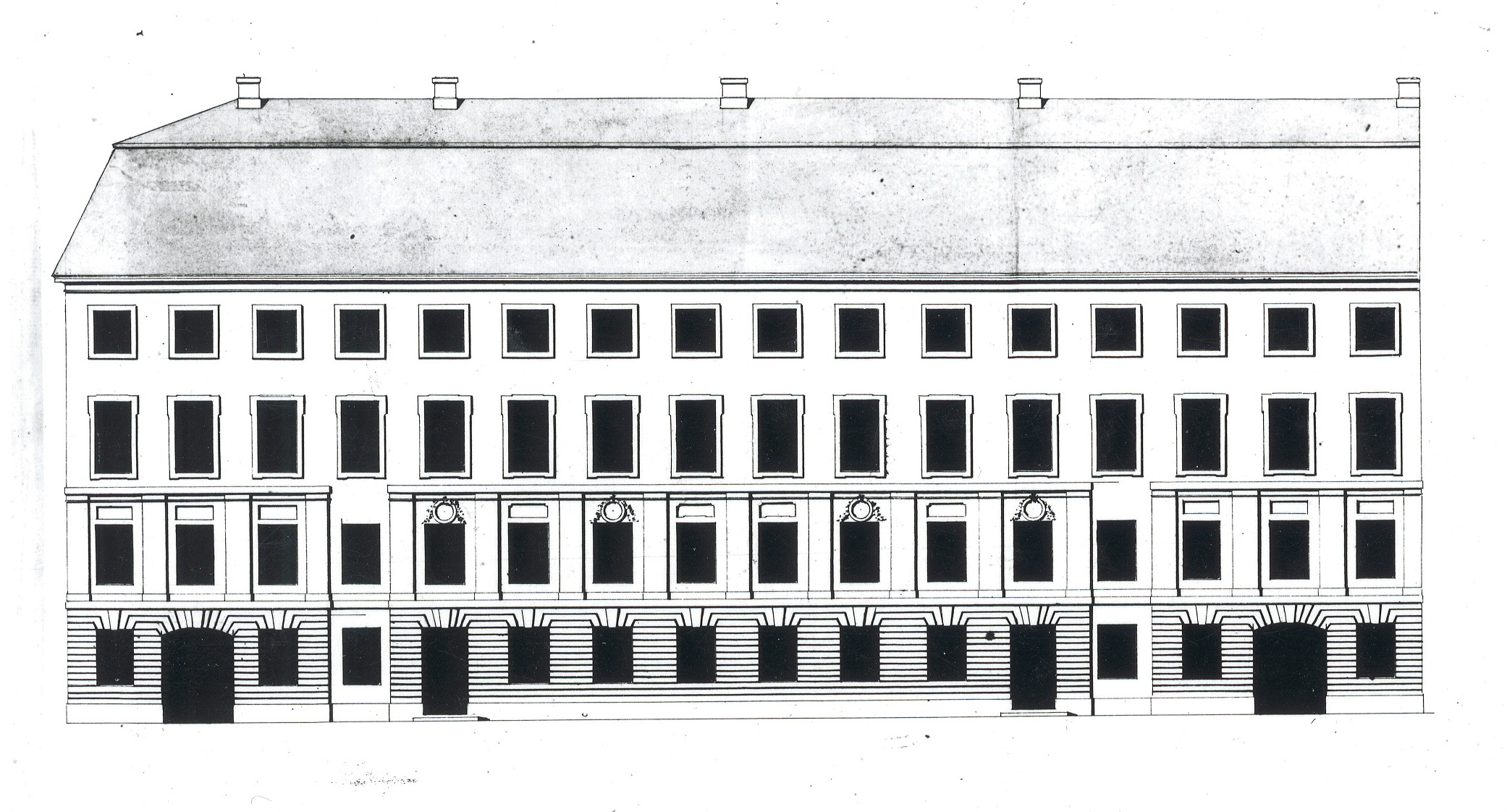 Västra Trädgårdsgatan, Spektern 8 (t.h.) och 9. Byggnadsår 1740, arkitekt Carl Hårleman, ombyggnad 1769-74, arkitekt J E Rehn, byggherre Charles De Geer.